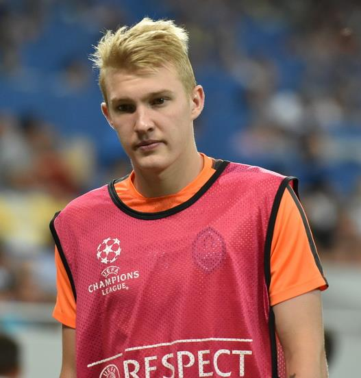 Viktor Kovalenko playing for Shakhtar. Віктор Вікторович Коваленко